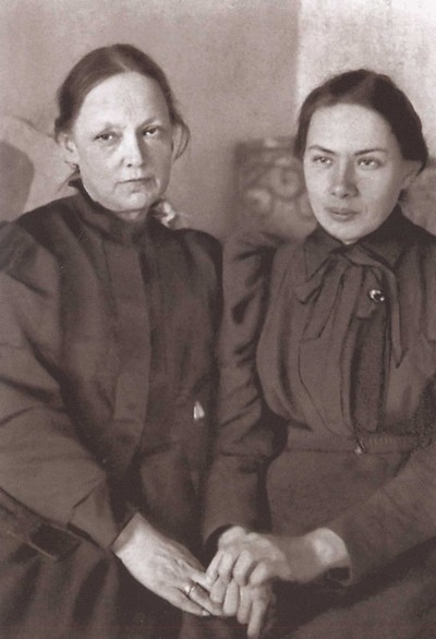 Елизавета Васильевна Крупская и Надежда Константиновна Крупская